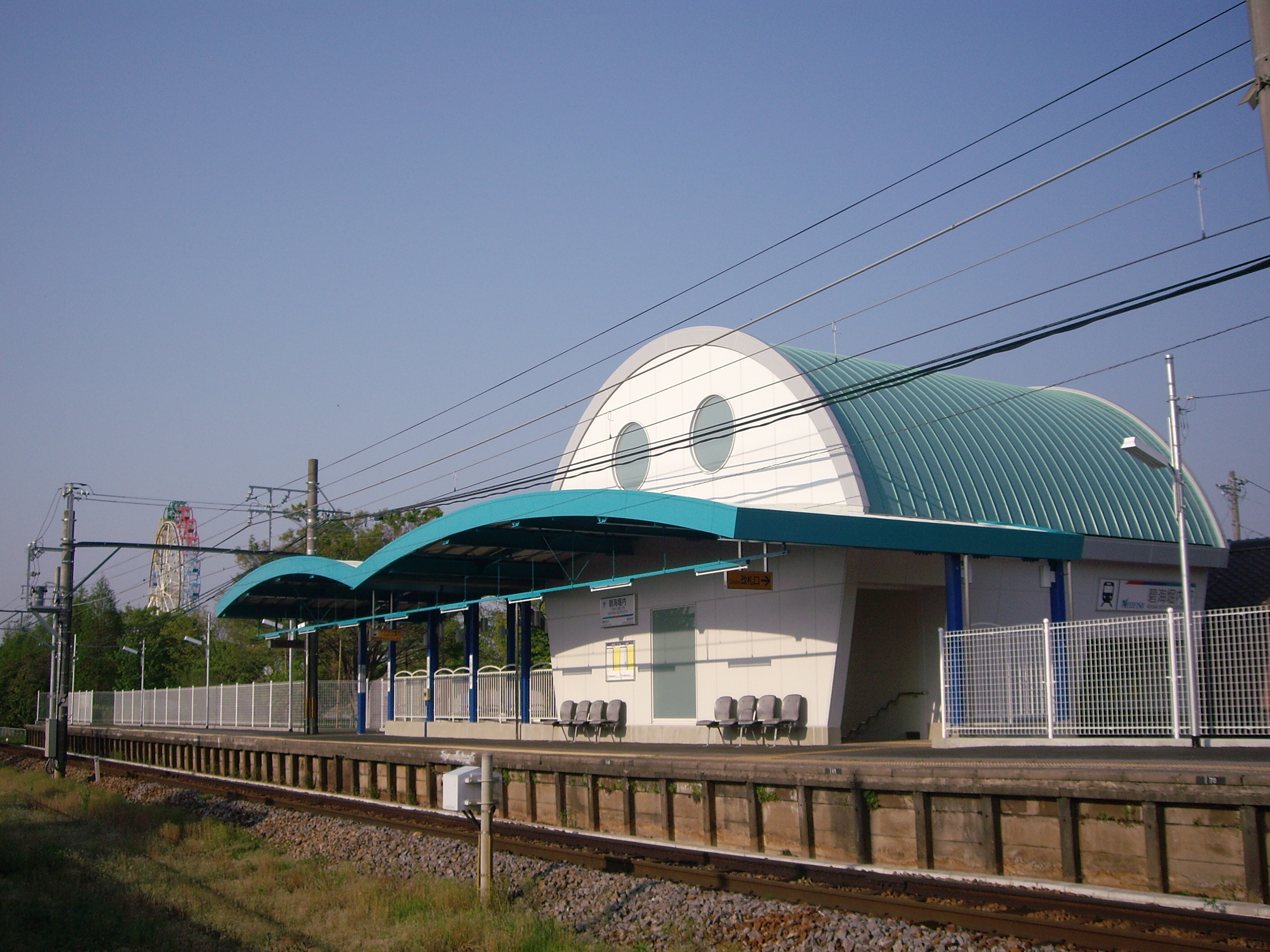 名鉄西尾線・碧海堀内駅ホーム